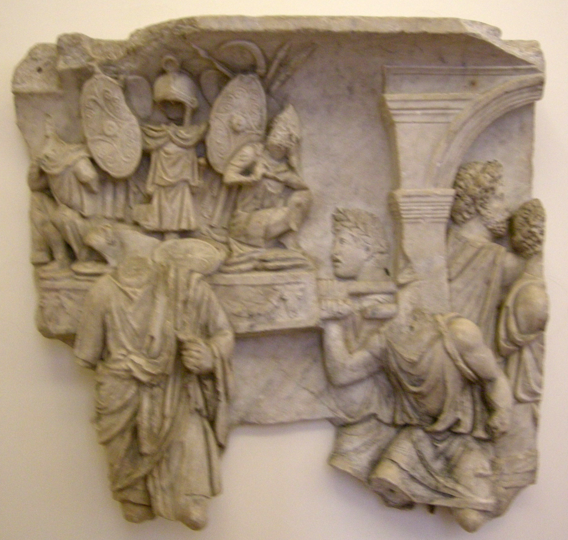 see filename; potrebbe trattarsi di un frammento dell'arco trionfale di Lucio Vero, fatto costruire in seguito alle vittoriose campagne contro i Parthi degli anni 162-166.